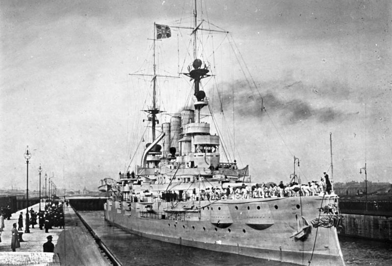 Linienschiff "SMS Deutschland" Linienschiff "S.M.S. Deutschland" in einer Schleuse